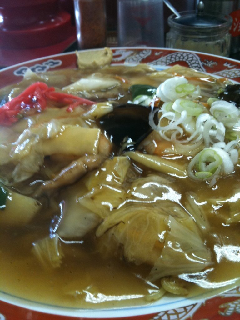 Yakisoba (Otaru Ankake Yakisoba)